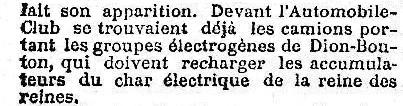 Détail de l'article. page 2, 1ère colonne.